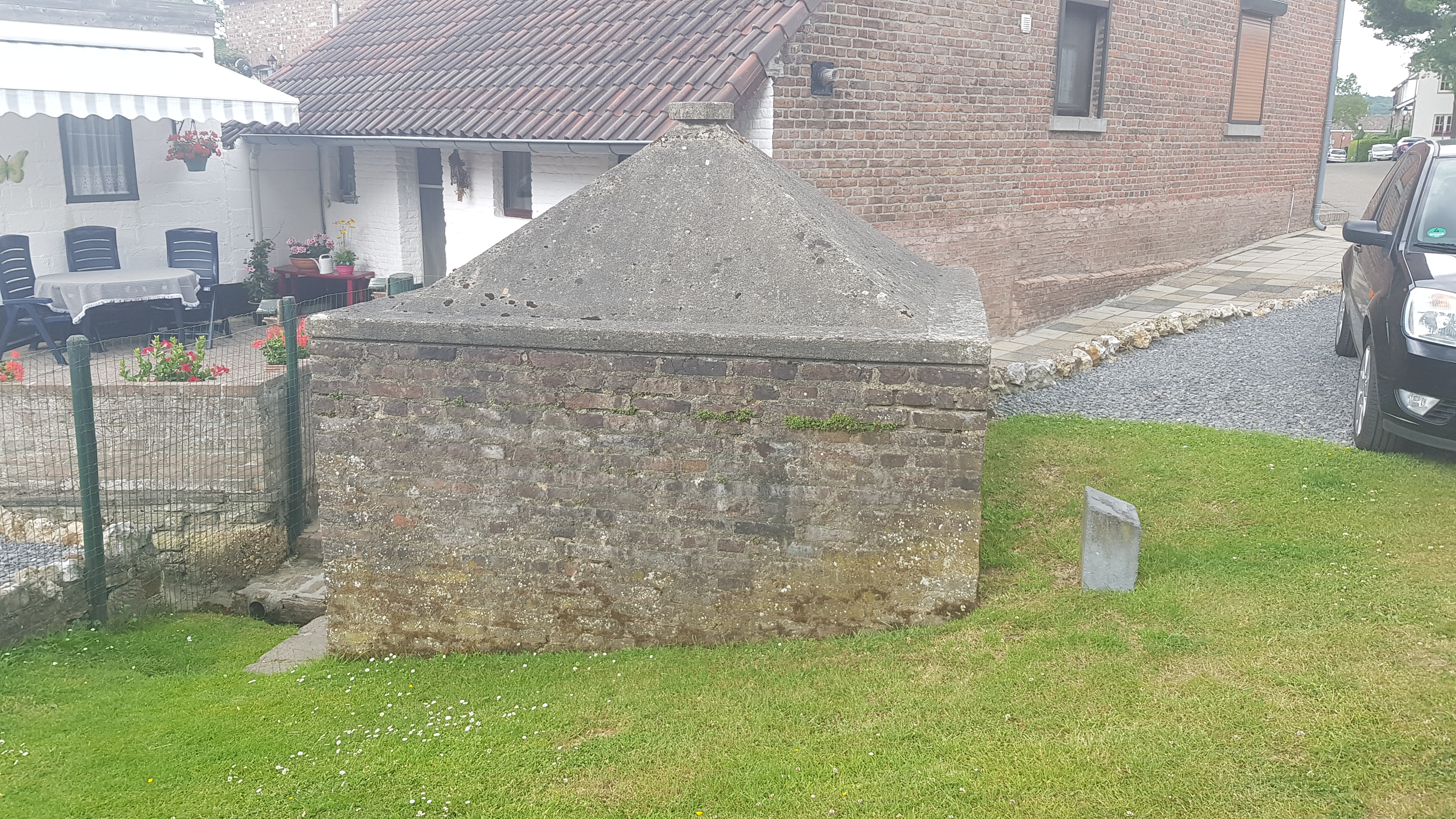 Paulusbron/Paulusborn in Epen, Nederland